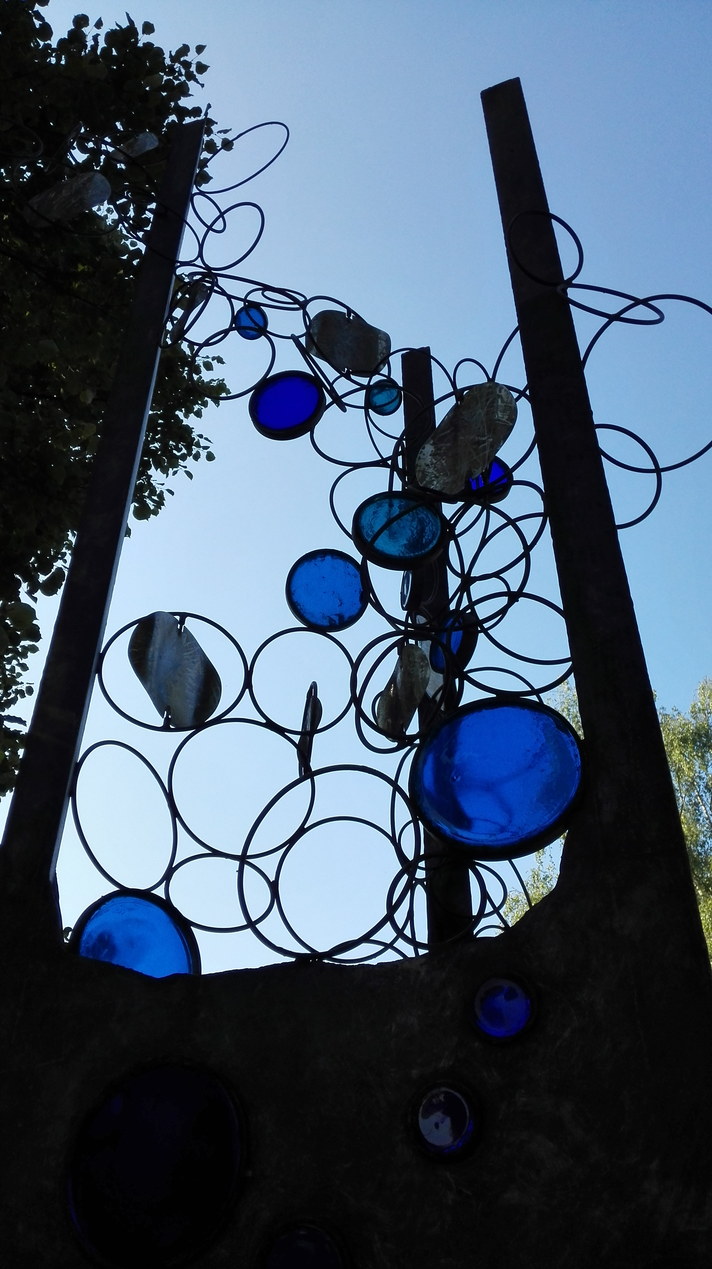 Plastik von Hilko Schomerus auf dem Platz vor der Nikodemuskirche Hannover.